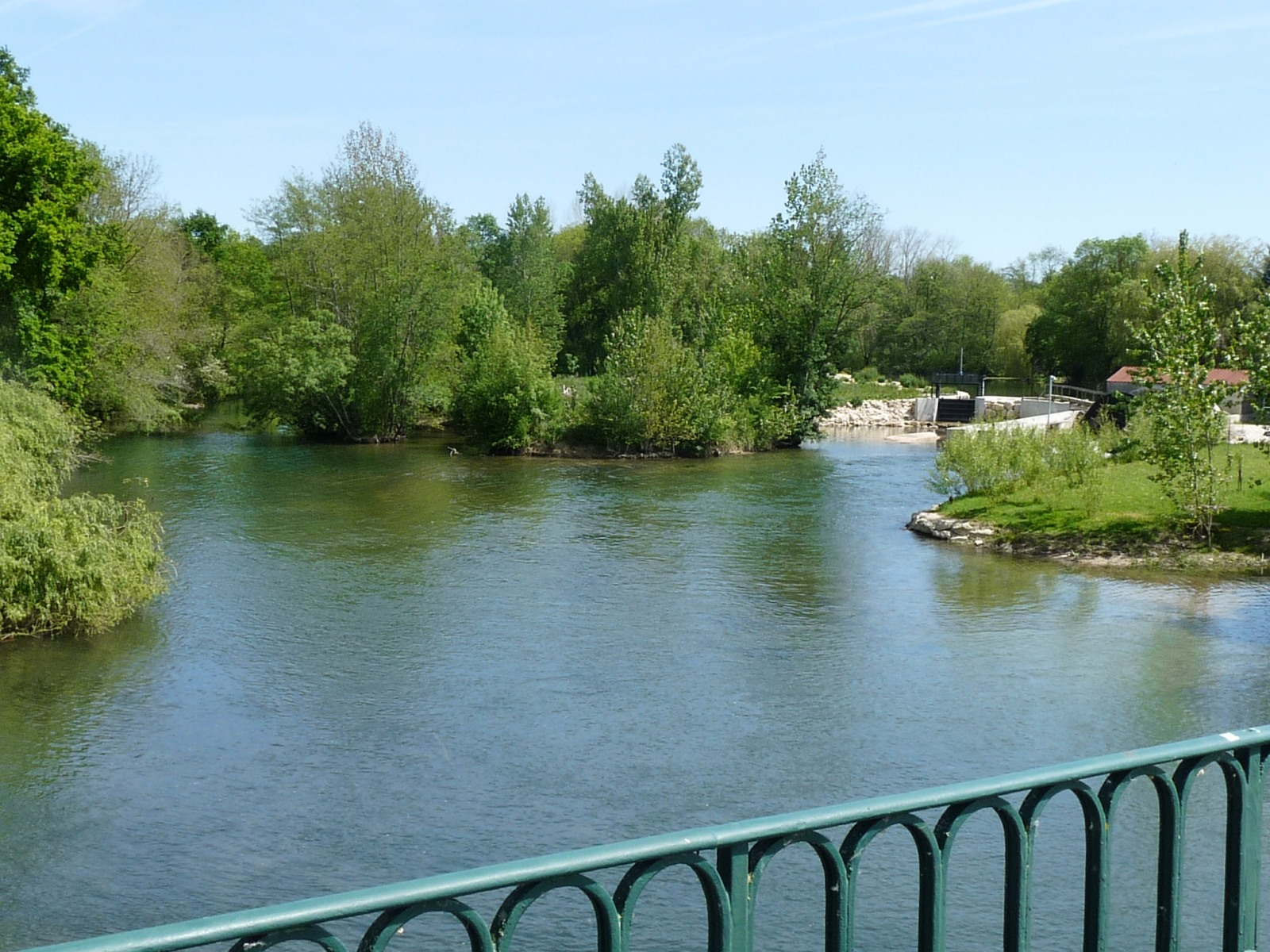 Pont sur la Charente (vue vers l'amont), La Chapelle, Charente, France